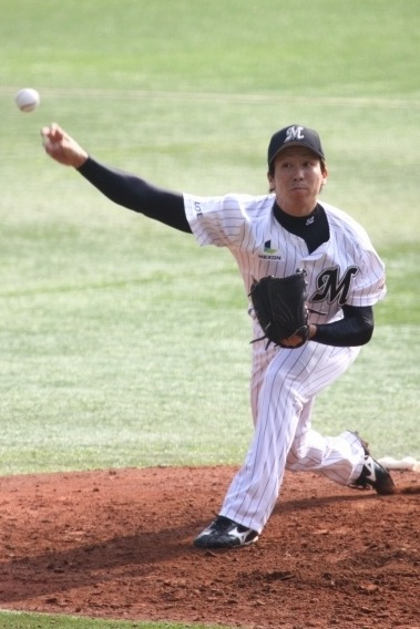 日本プロ野球 千葉ロッテマリーンズ 益田直也 投手 背番号52